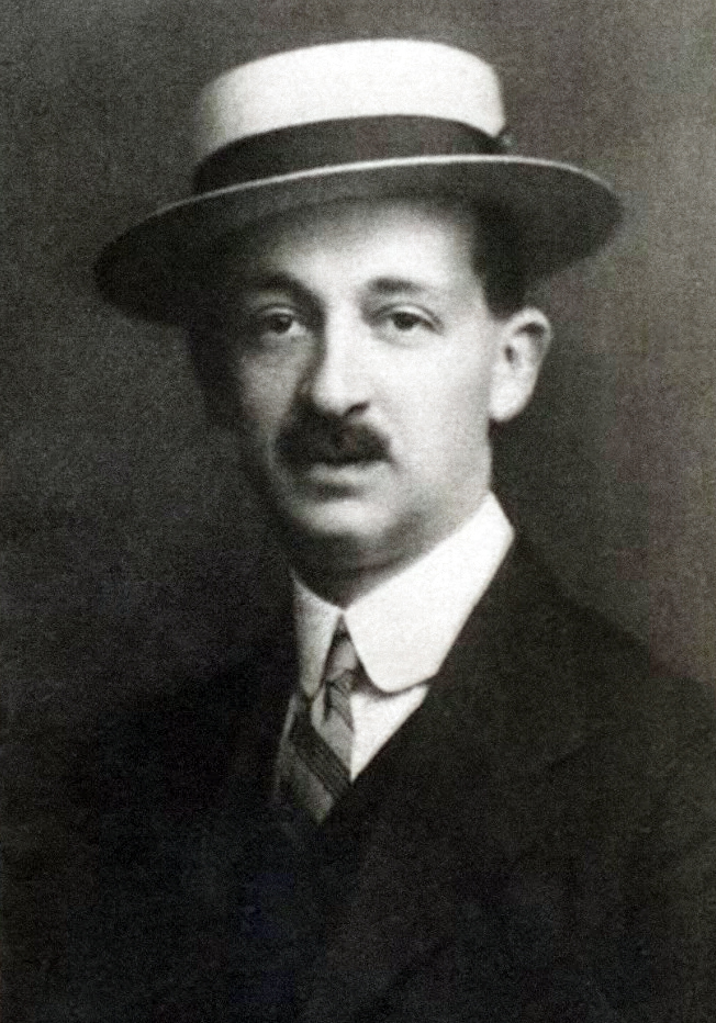 Louis de Windisch Graetz